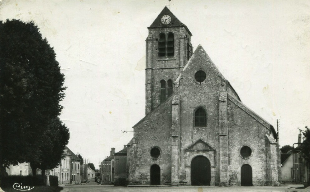 église Saint-Martin d'Auxy, Loiret, Centre, France